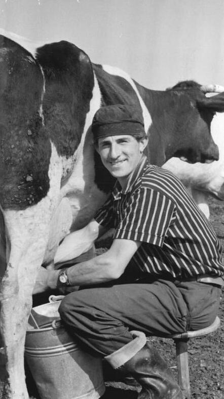 Poseritz-Swantow, Bauer beim Melken Zentralbild Schneider 25.6.60 Beispielhafte Initiative der Genossenschaftsbauern von Poseritz-Swantow zur Erhöhung der Kuhbestände und zur Steigerung der Milchproduktion. Immer mehr Melker im Ostseebezirk Rostock arbeiten unter dem Motto -"Technik - Kühe - Überfluß" nach dem Beispiel der sozialistischen Arbeitsgemeinschaft für Rinderzucht in der LPG "Völkerfreundschaft" in Poseritz-Swantow (Rügen). Die Genossenschaftsbauern von Poseritz haben sich zum Ziel gesetzt: Bis zum 1.1.1961 soll der Kuhbestand von 832 auf 1156 und bis 1.4.1961 auf 1270 aus eigener Nachzucht erhöht werden. Die Milchleistung soll pro Kuh und Jahr von 3000 bis 4500 kg gesteigert werden. In den ersten fünf Monaten dieses Jahres wurden bereits pro Kuh 1000 kg Milch mit einem Fettgehalt von 3, 5% abgeliefert. Weiterhin haben sich die Posenritzer Genossenschaftsbauern vorgenommen, den 100 ha Besatz von 40 Kühen nicht erst 1963, sondern bereits schon am 1.4 1961 zu erreichen. UBz: Melker Klaus Much, Mitglied der FDJ und Angehöriger der Jugendbrigade des hervorragenden Genossenschaftsbauern Erwin Stöcker von der LPG Poseritz.